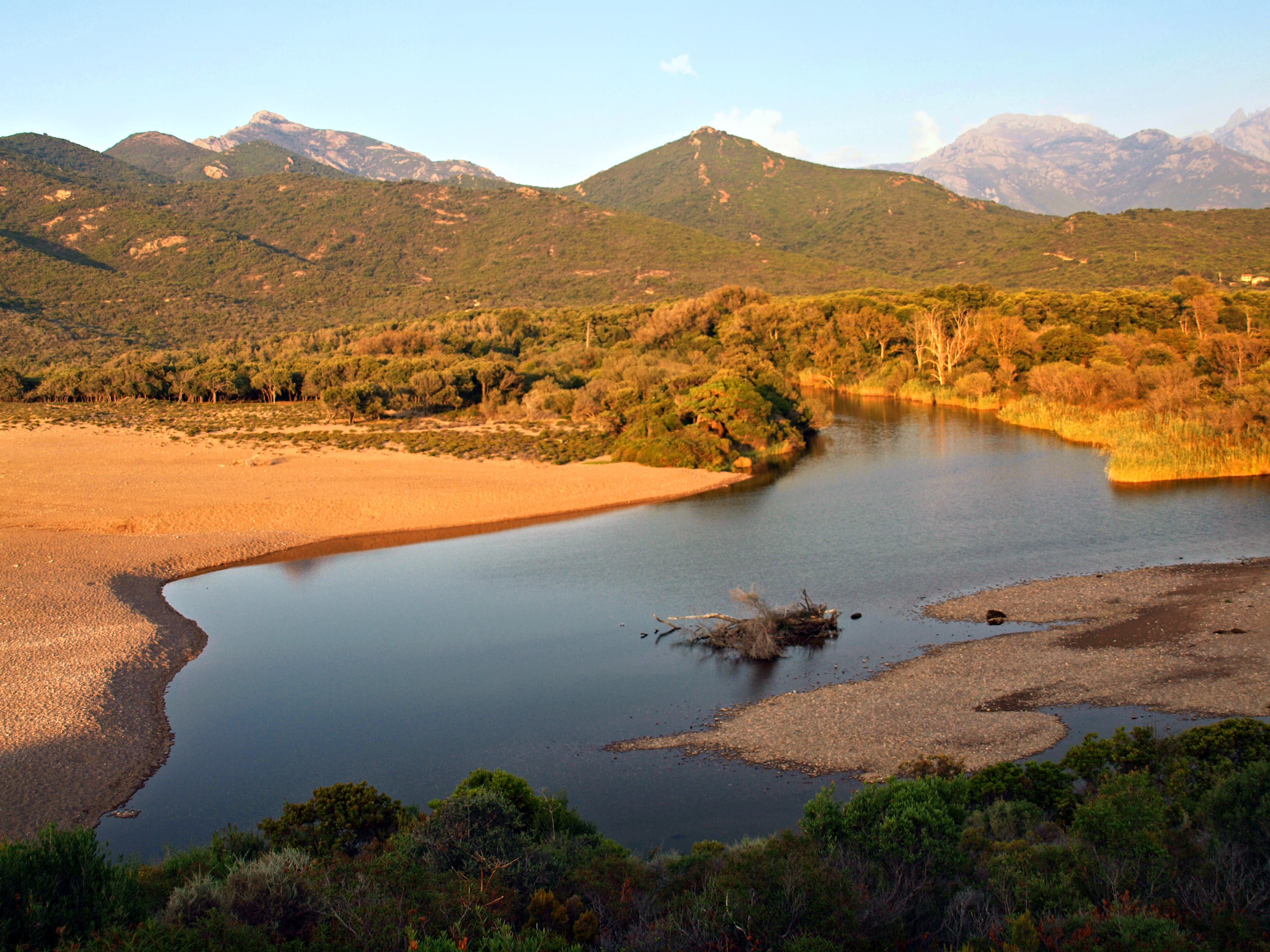 Galéria (Corse) - Delta du Fango